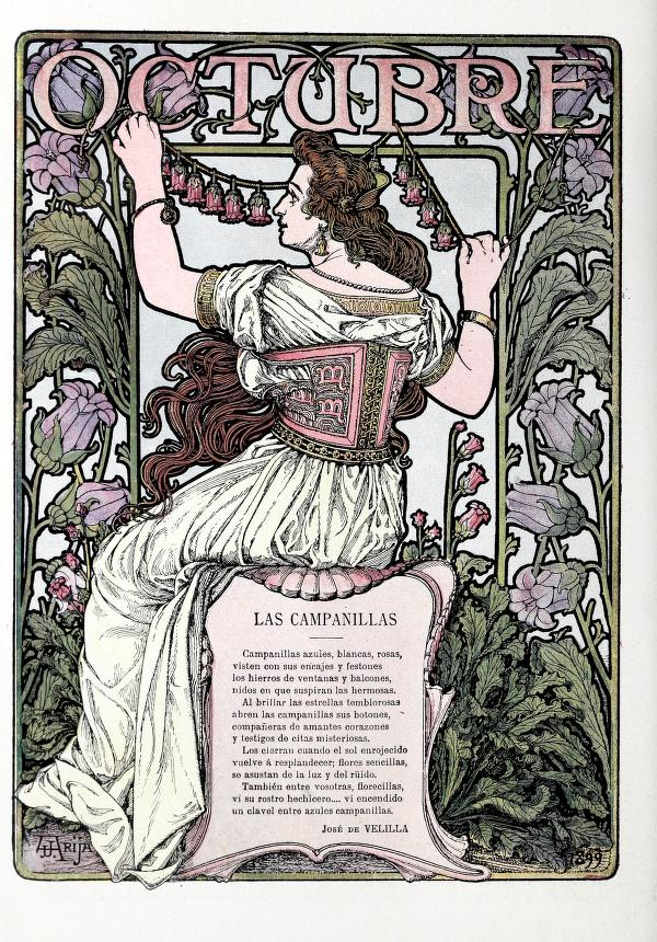 Octubre.